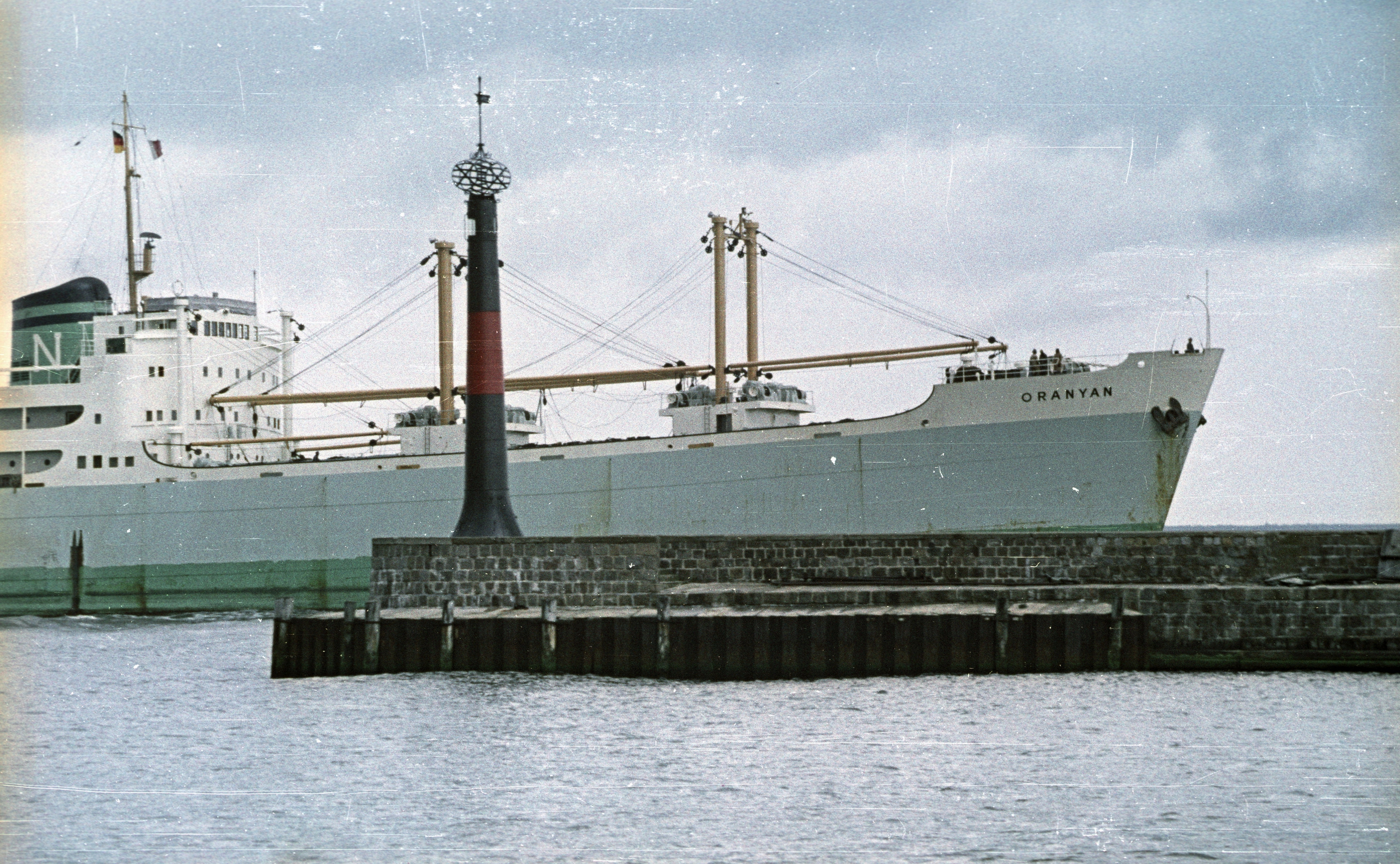 az Alter Strom kikötő, szemben az Oranyan tengeri áruszállító hajó.